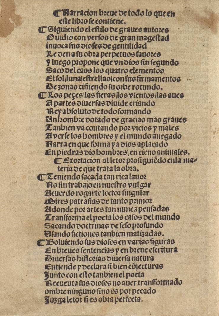 "Libro del Metamorphoseos y fabulas del excelēte poeta y philosofo Ouidio noule cauallero Patricio romano ; traduzido de latín en romançe". Primera traducción castellana de las Metamorfosis de Ovidio hecha por Jorge de Bustamante, s.l., s.n., 1542. Biblioteca Nacional de España. Folio 6v.: "Narración breve de todo lo que en este libro se contiene". Acróstico. Tomando la primera letra de cada verso, empezando desde el final y excluidos los dos títulos se lee "Jorje de Bustamante natural de Sylios".